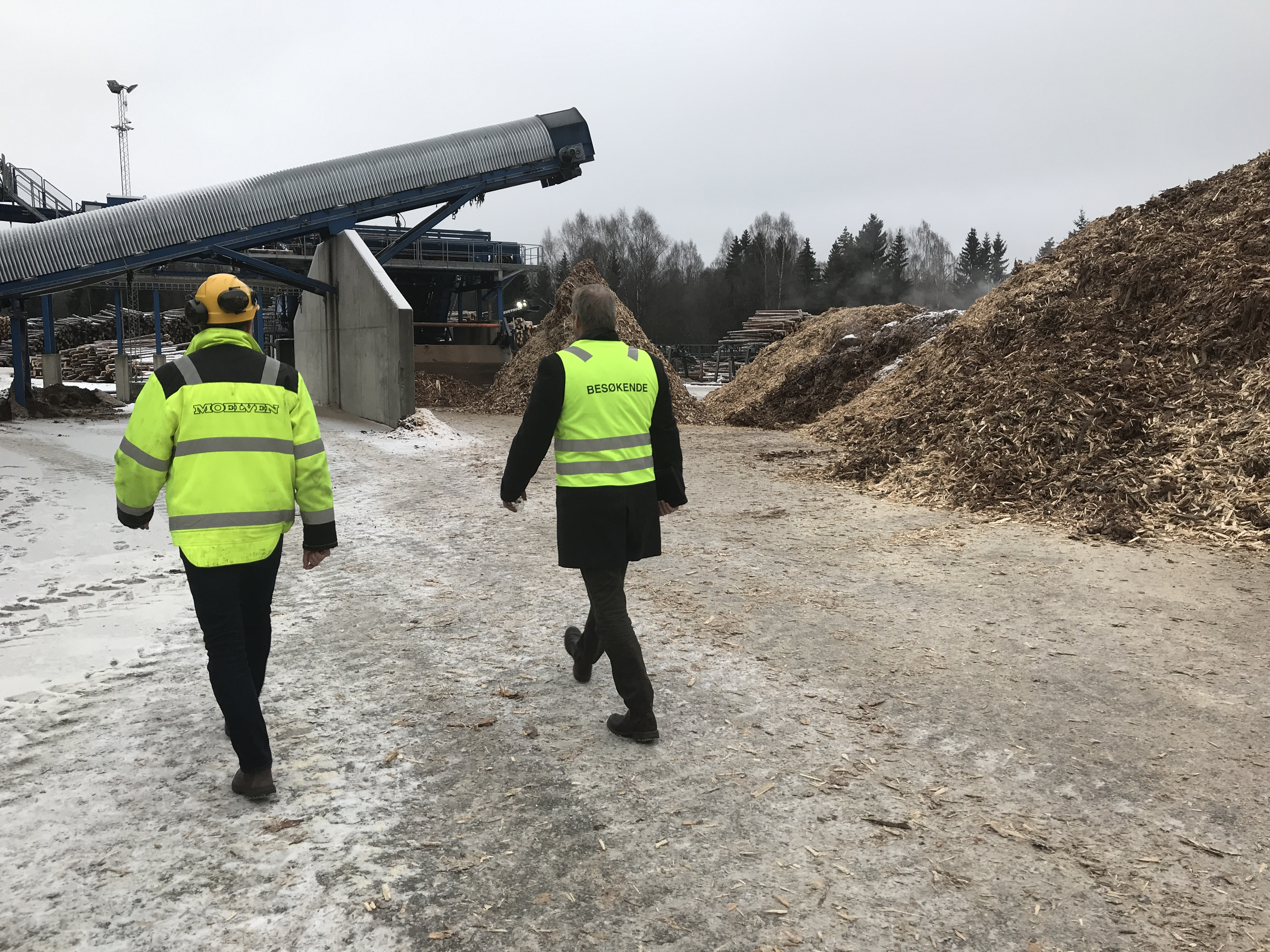 Moelven Mjøsbruket, Biri, treflis, tømmer, gran, skogbruk, sagbruk